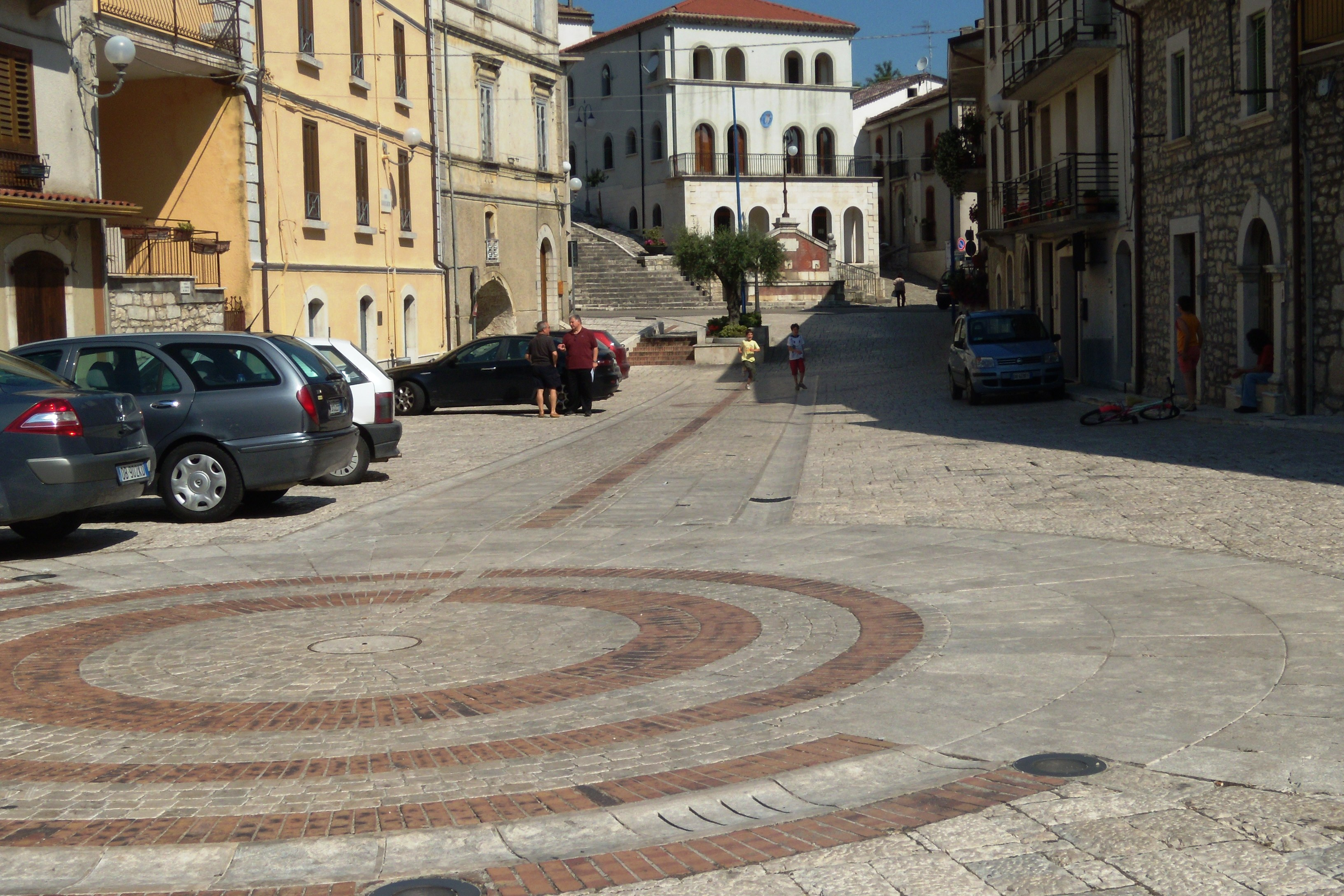 Piazza De Agostini di Campolattaro (Benevento - Italia).